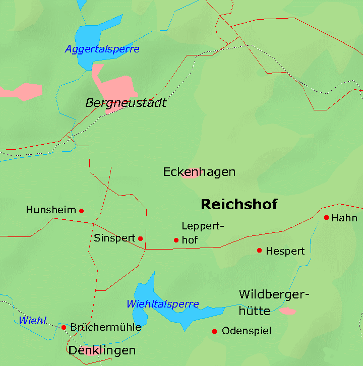 Karte von Reichshof und den wichtigsten Ortschaften